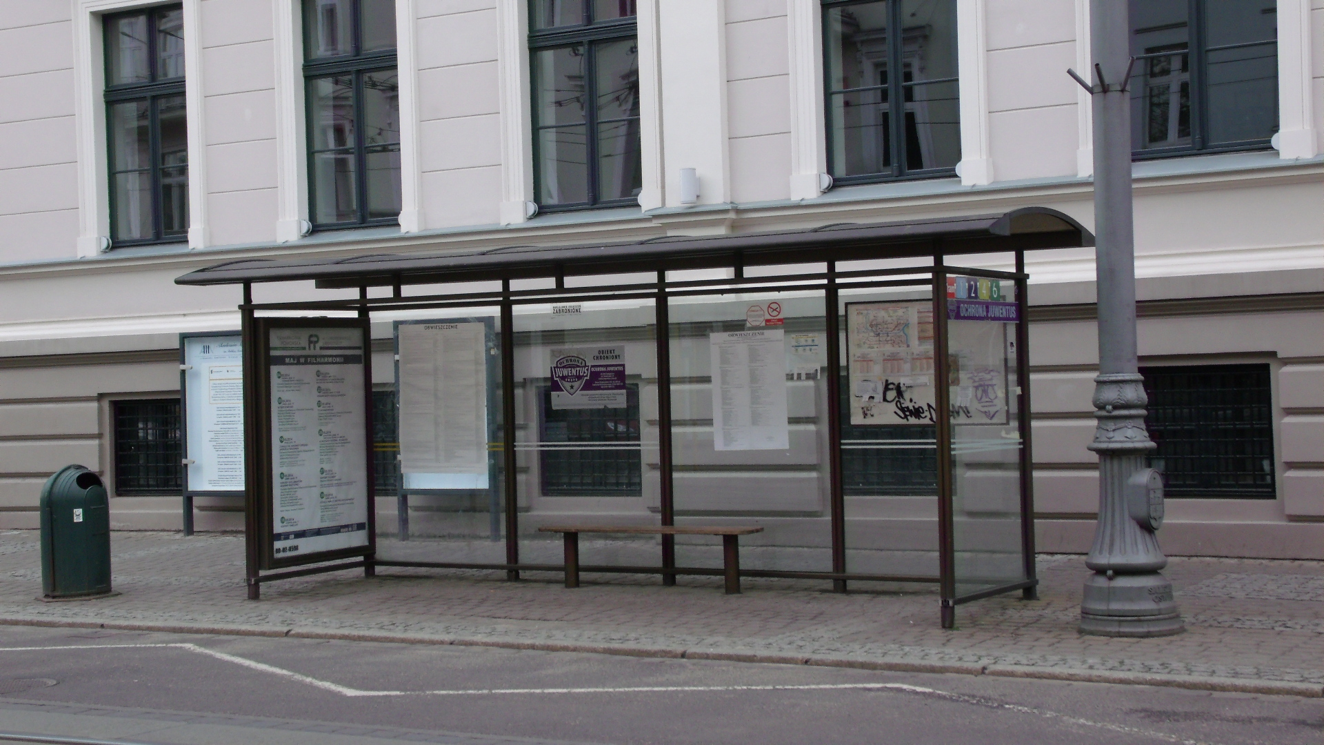 Przystanek ul. Gdańska, Bydgoszcz.